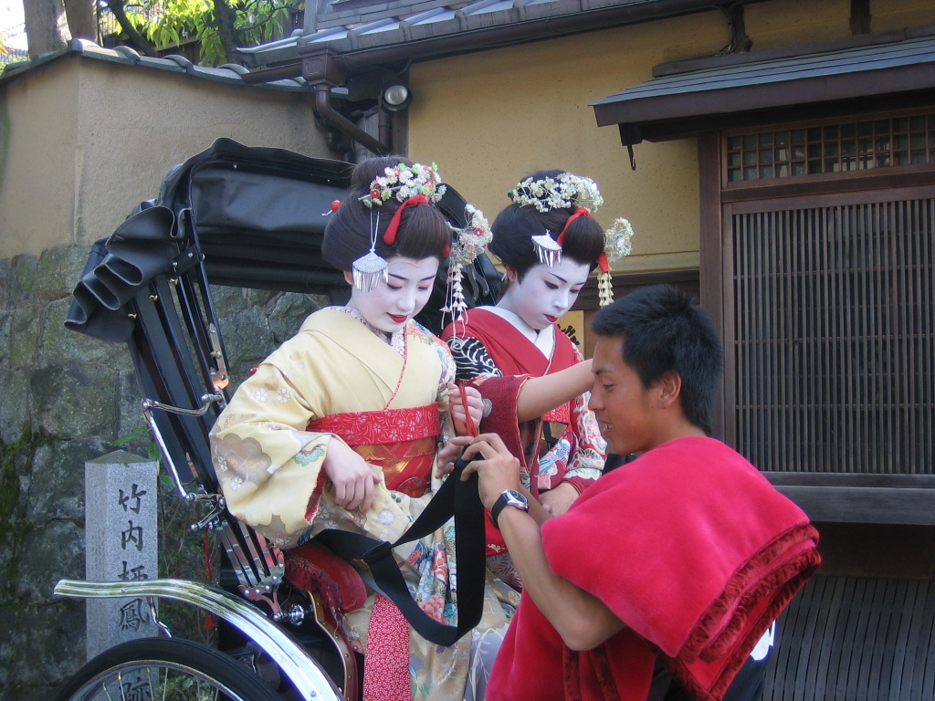 人力車に乗る舞妓装束の観光客（京都東山区八坂通下河原東入ル八坂上町、高台寺南門前の竹内栖鳳邸跡）Geishas on a taxi